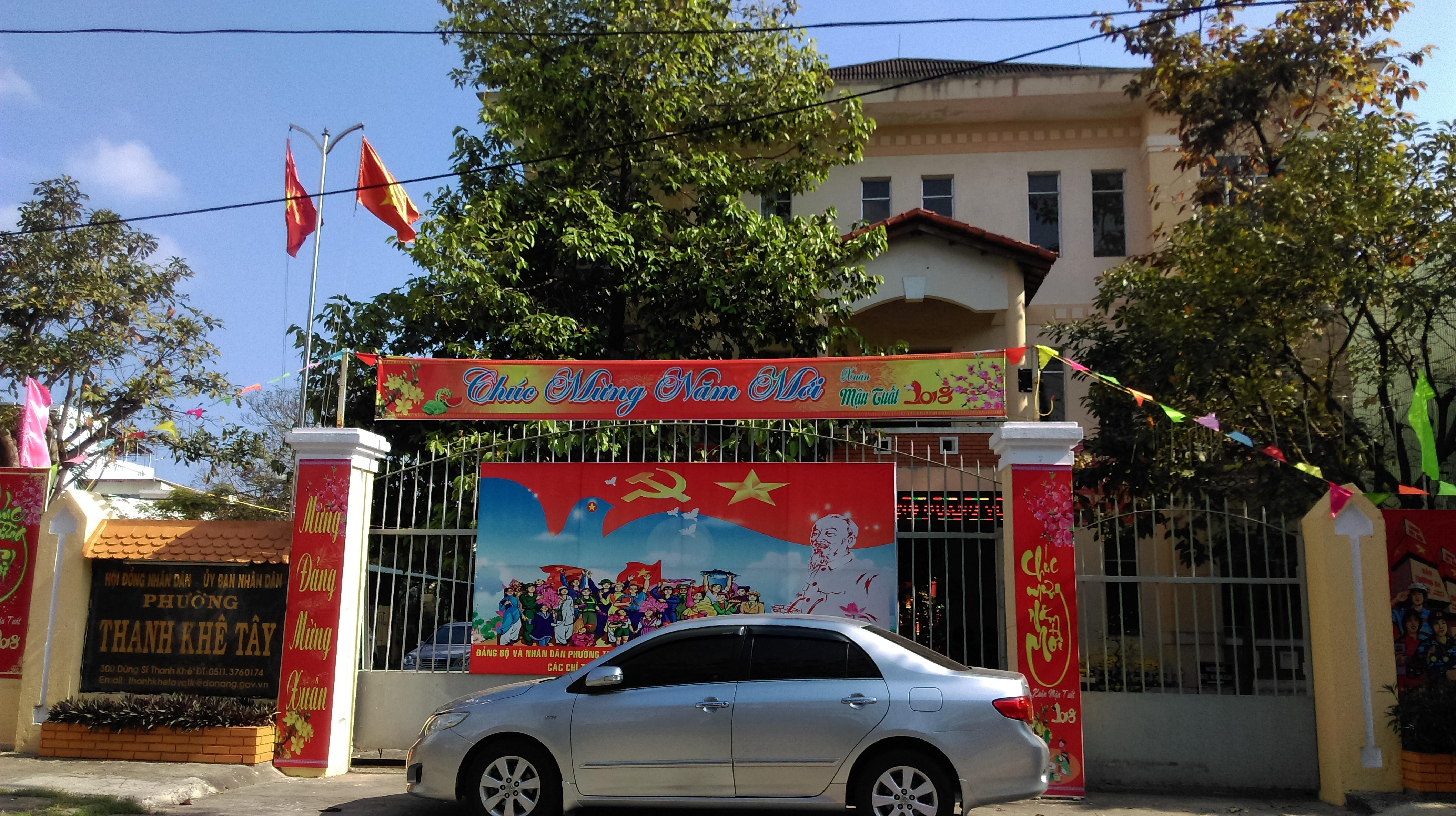 UBND phường Thanh Khê Tây, Thanh Khê, Đà Nẵng